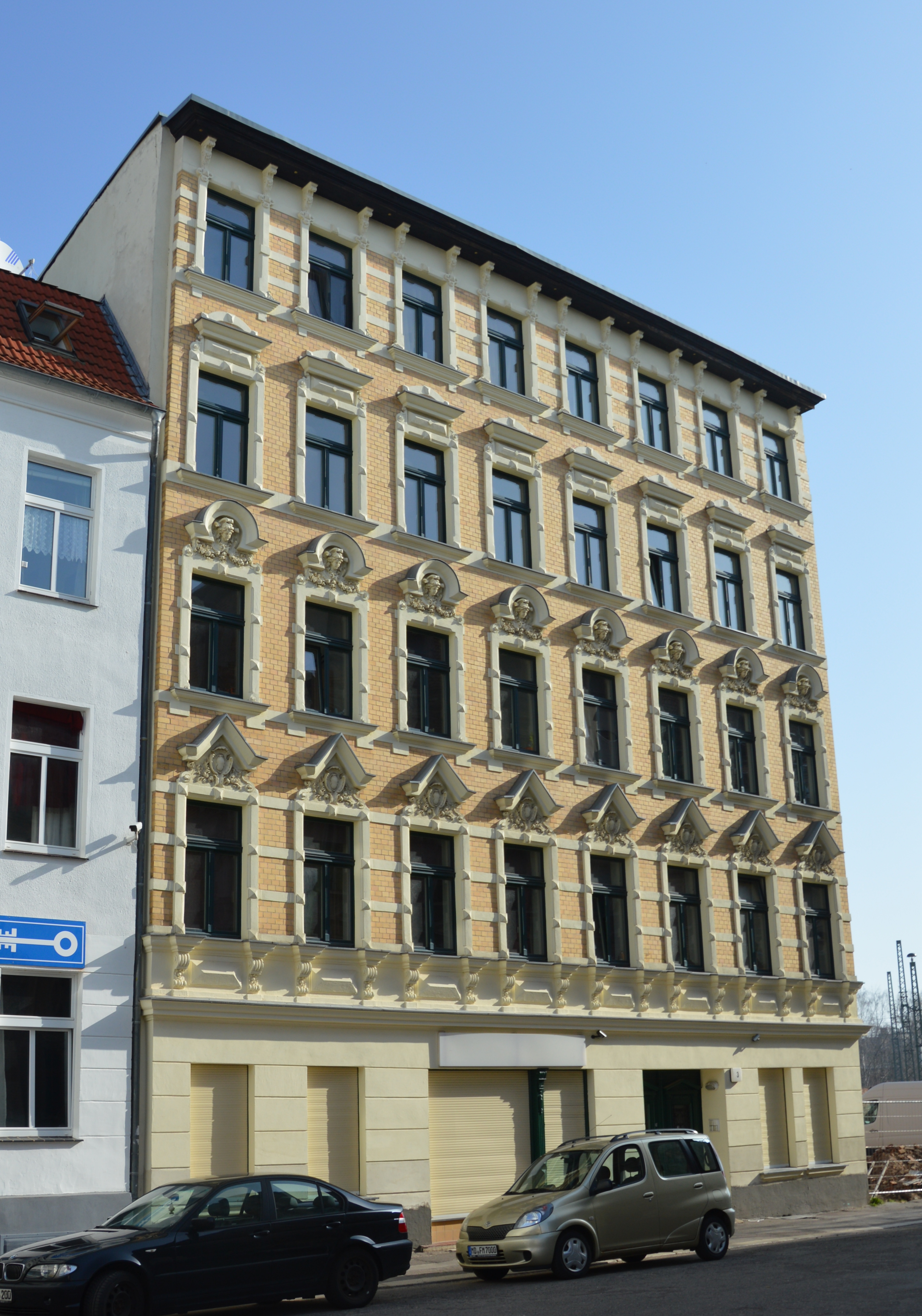 Sudenburger Straße 3 in Magdeburg